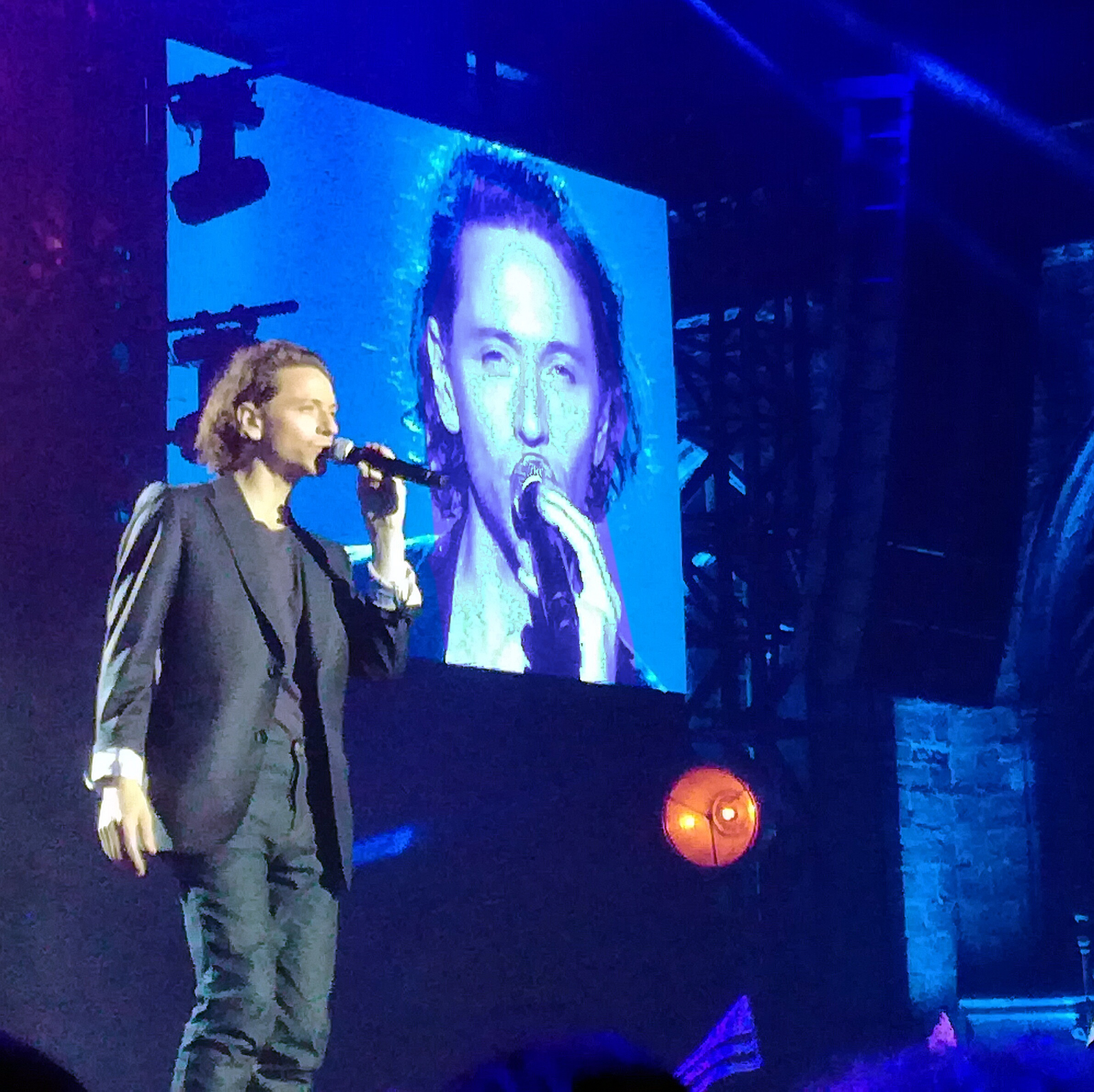 Raphael lors du tournage de l'émission Les Copains d'abord en Bretagne, place Saint-Corentin à Quimper.